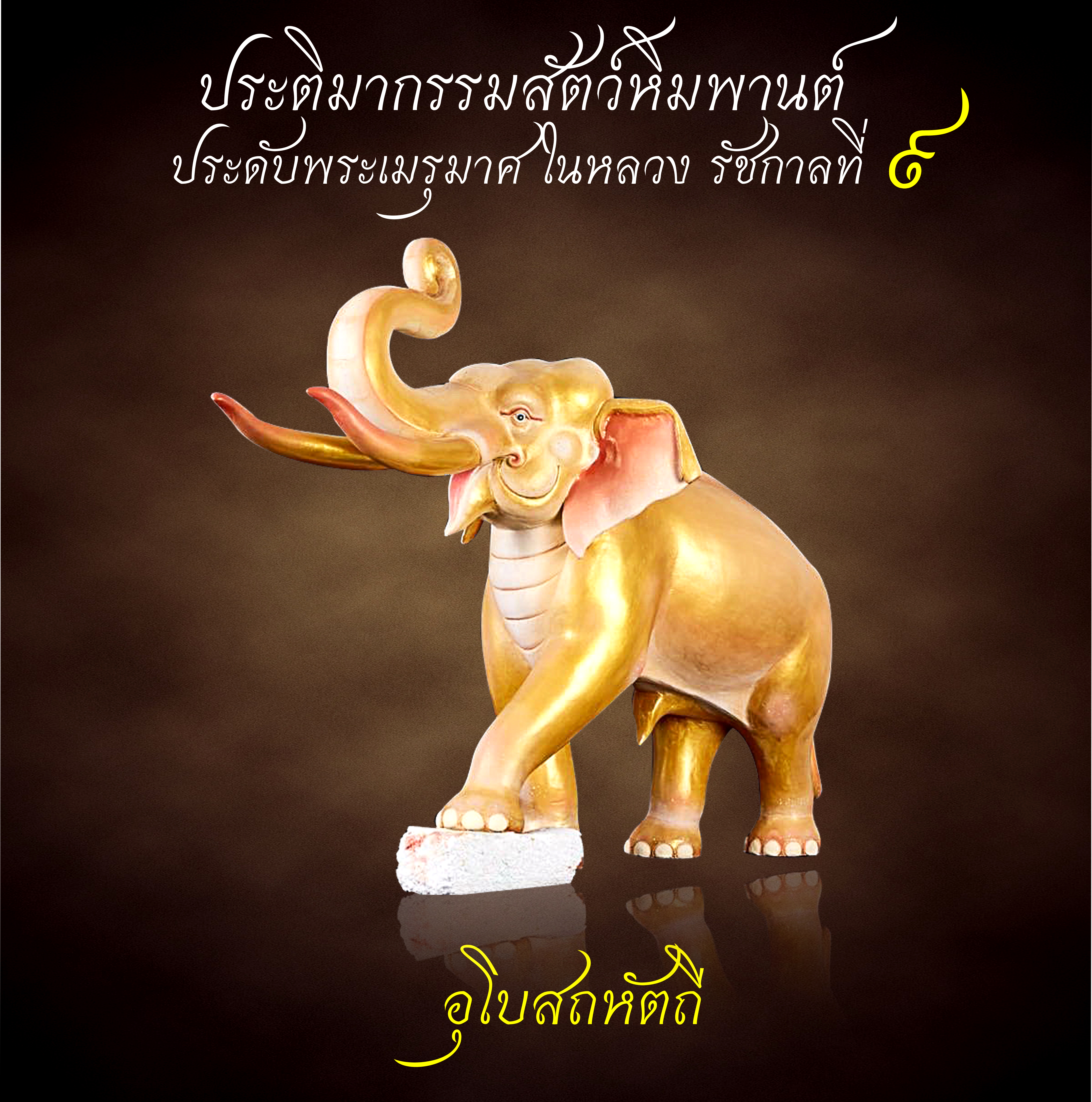 อุโบสถหัตถี ช้างตระกูลพรหมพงศ์ ประติมากรรมสัตว์หิมพานต์ประดับพระเมรุมาศในหลวงรัชกาลที่๙